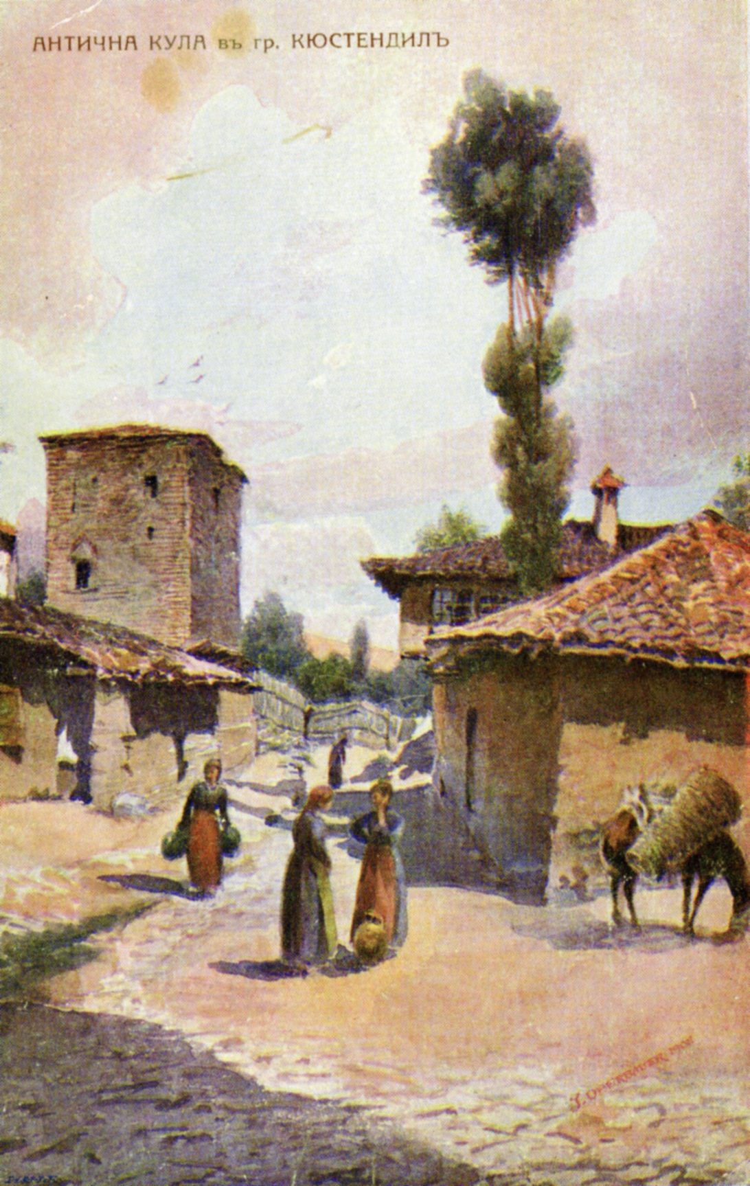 Pyrgos Tower, postcard